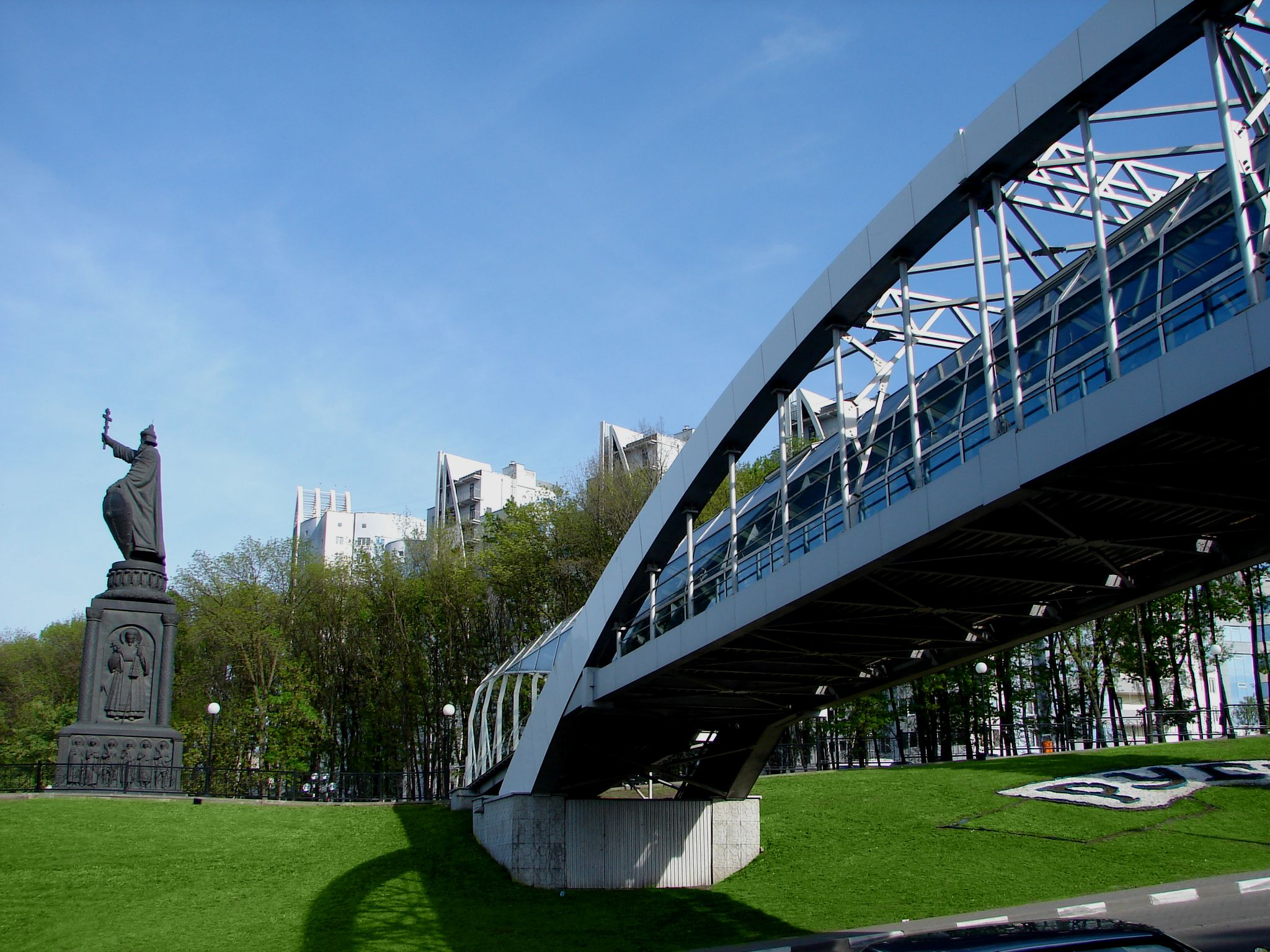 Пешеходный мост над проспектом Ватутина, г. Белгород